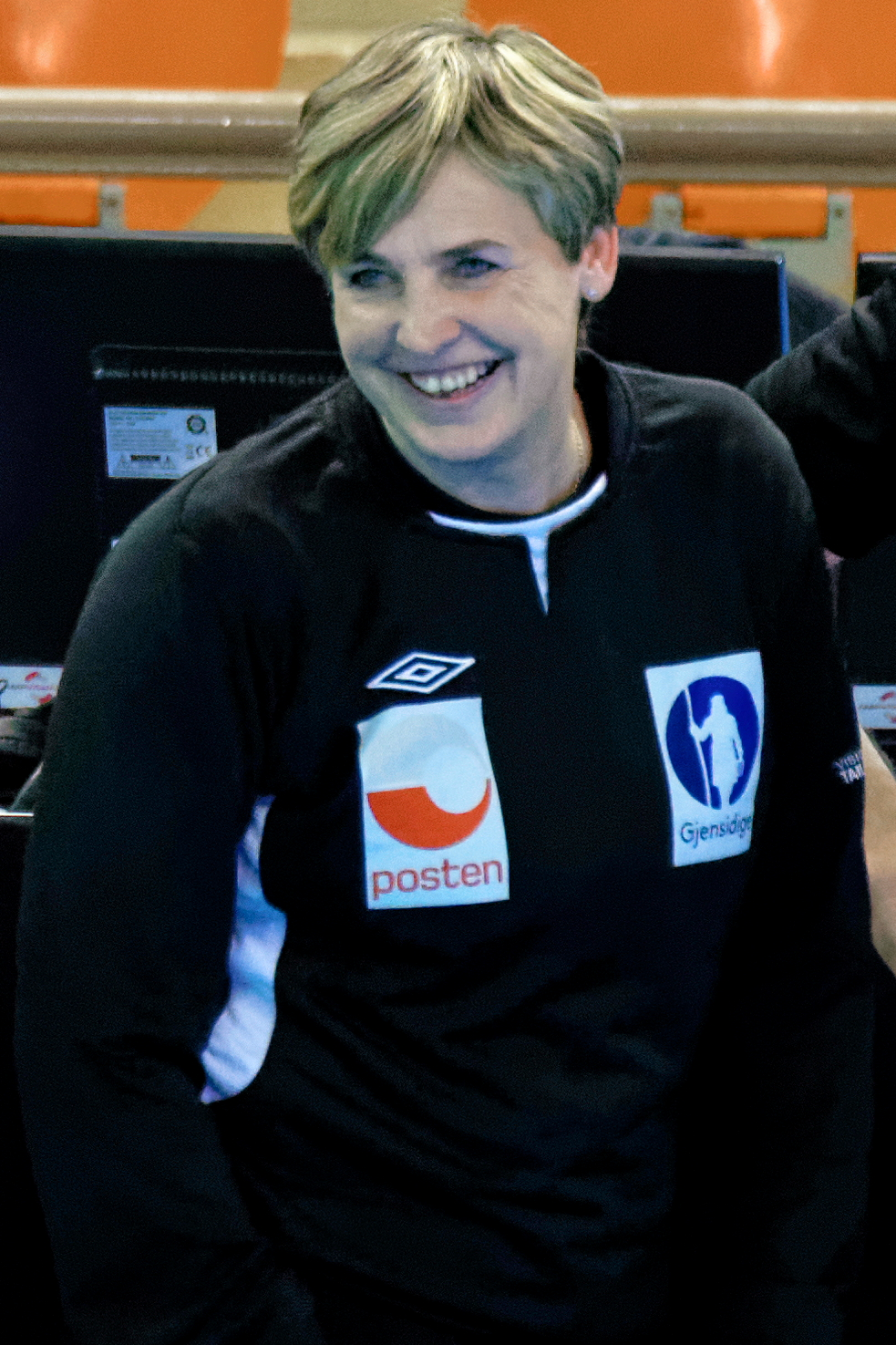 Mia Hermansson-Högdahl, entraîneur adjoint de l'équipe féminine de Norvège de handball. Lors du match Norvège / Pologne pendant la Golden League, le 19 mars 2015.